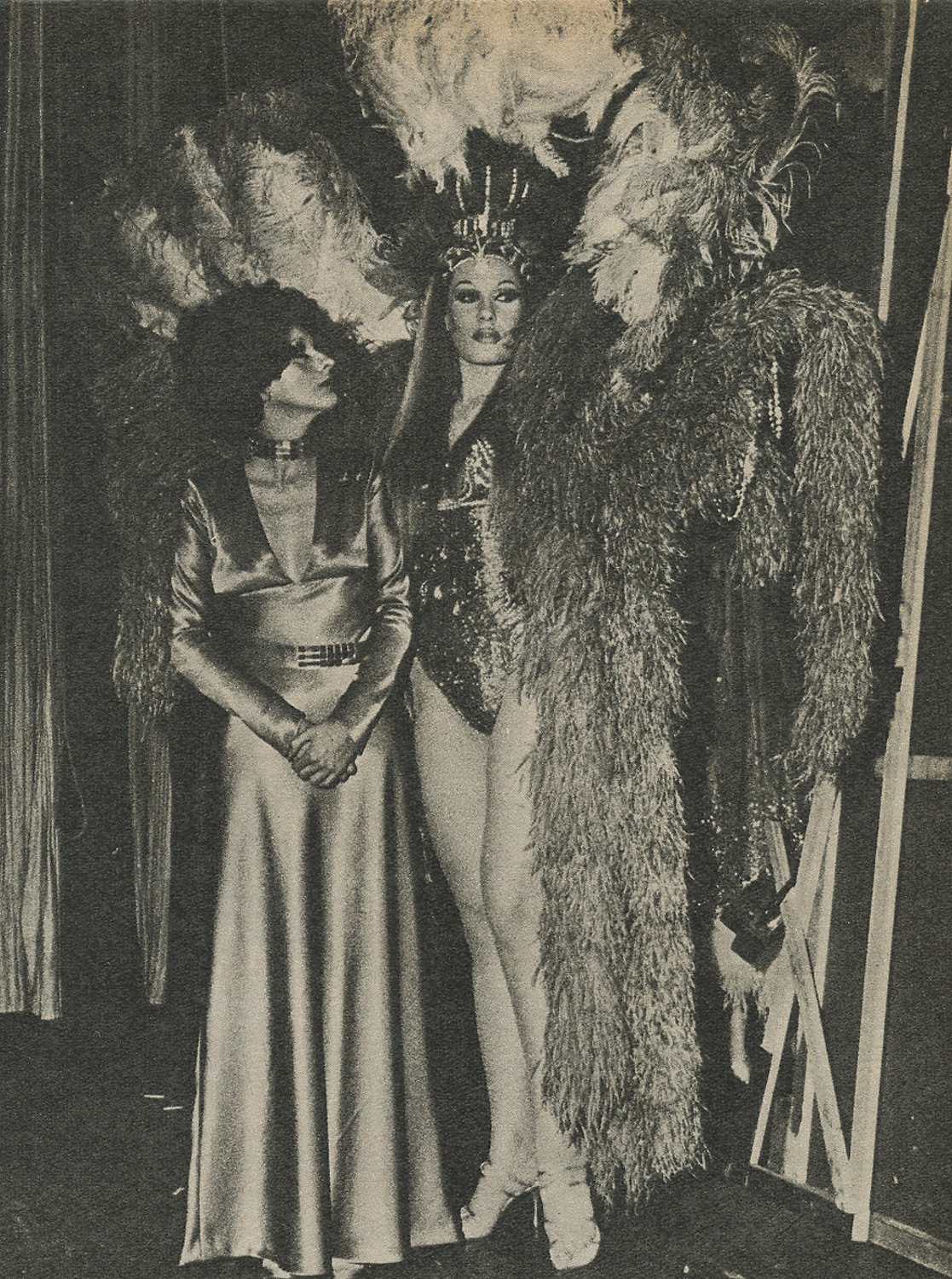 Nacha Guevara y Norma Pons en el Teatro Maipo, para la revista Siete días ilustrados.